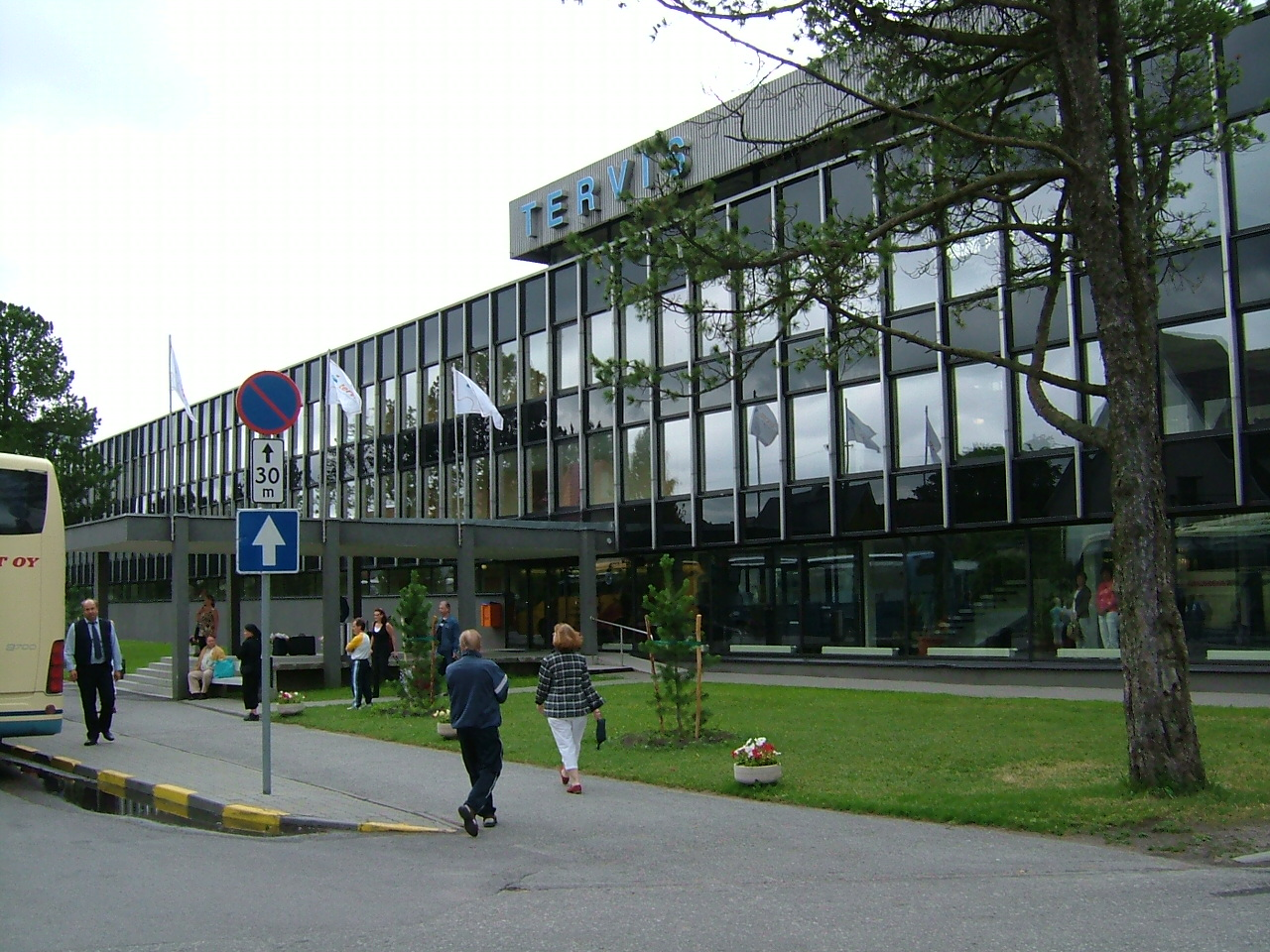 Tervise Paradiis